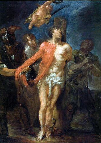 sketch